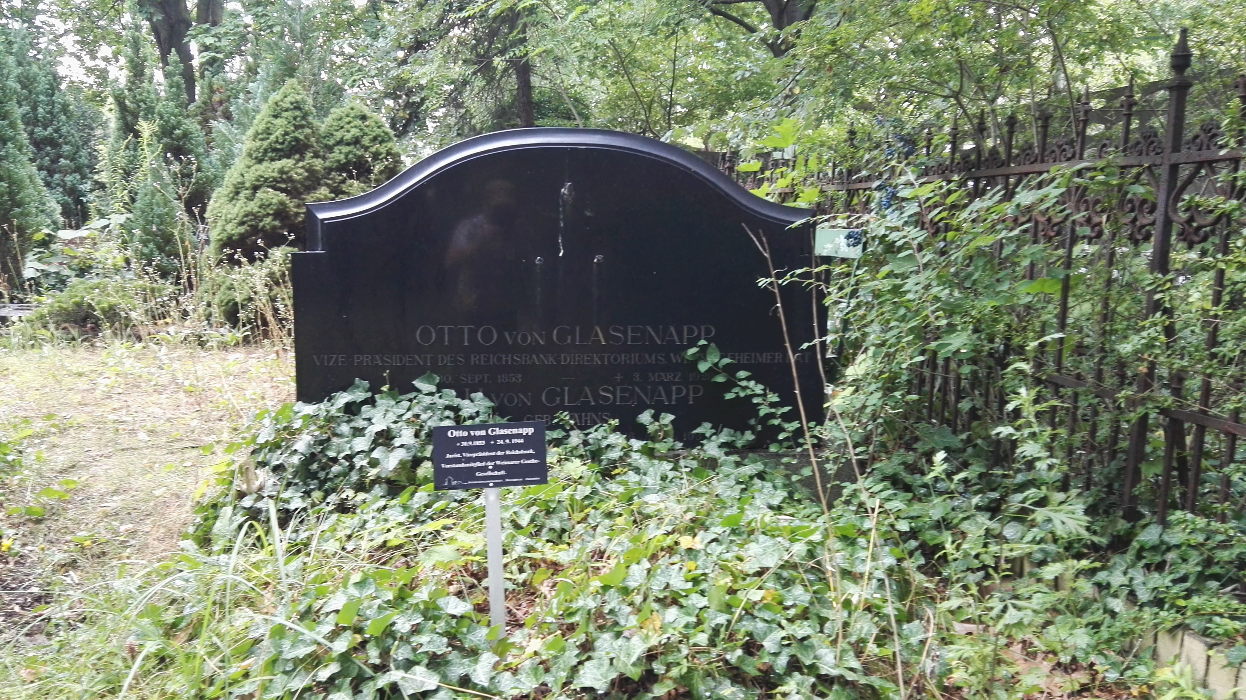 Grab von Otto von Glasenapp auf dem Friedhof der Bethlehems- oder Böhmischen Gemeinde